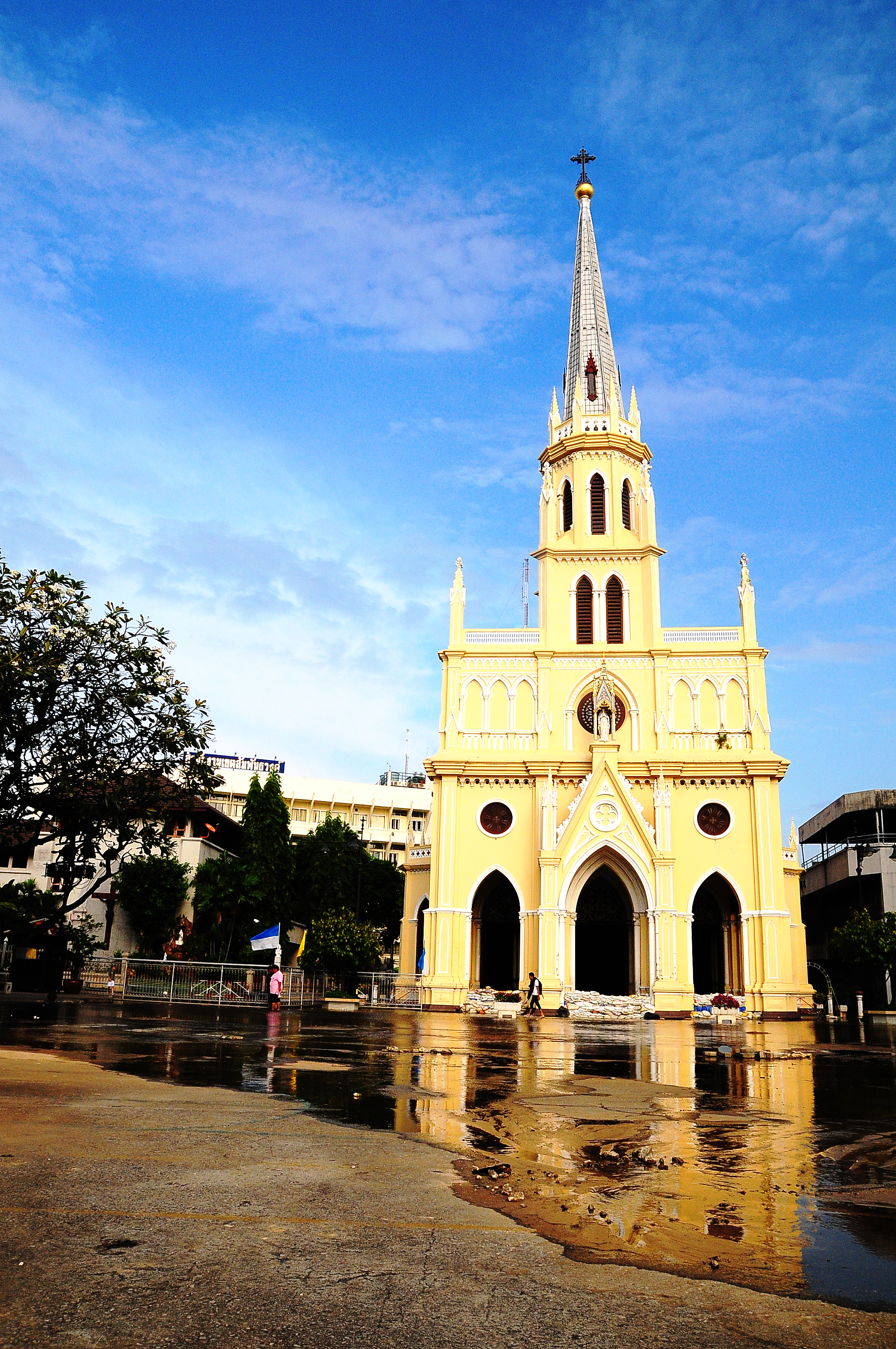 วัดแม่พระลูกประคำ (กาลหว่าร์)